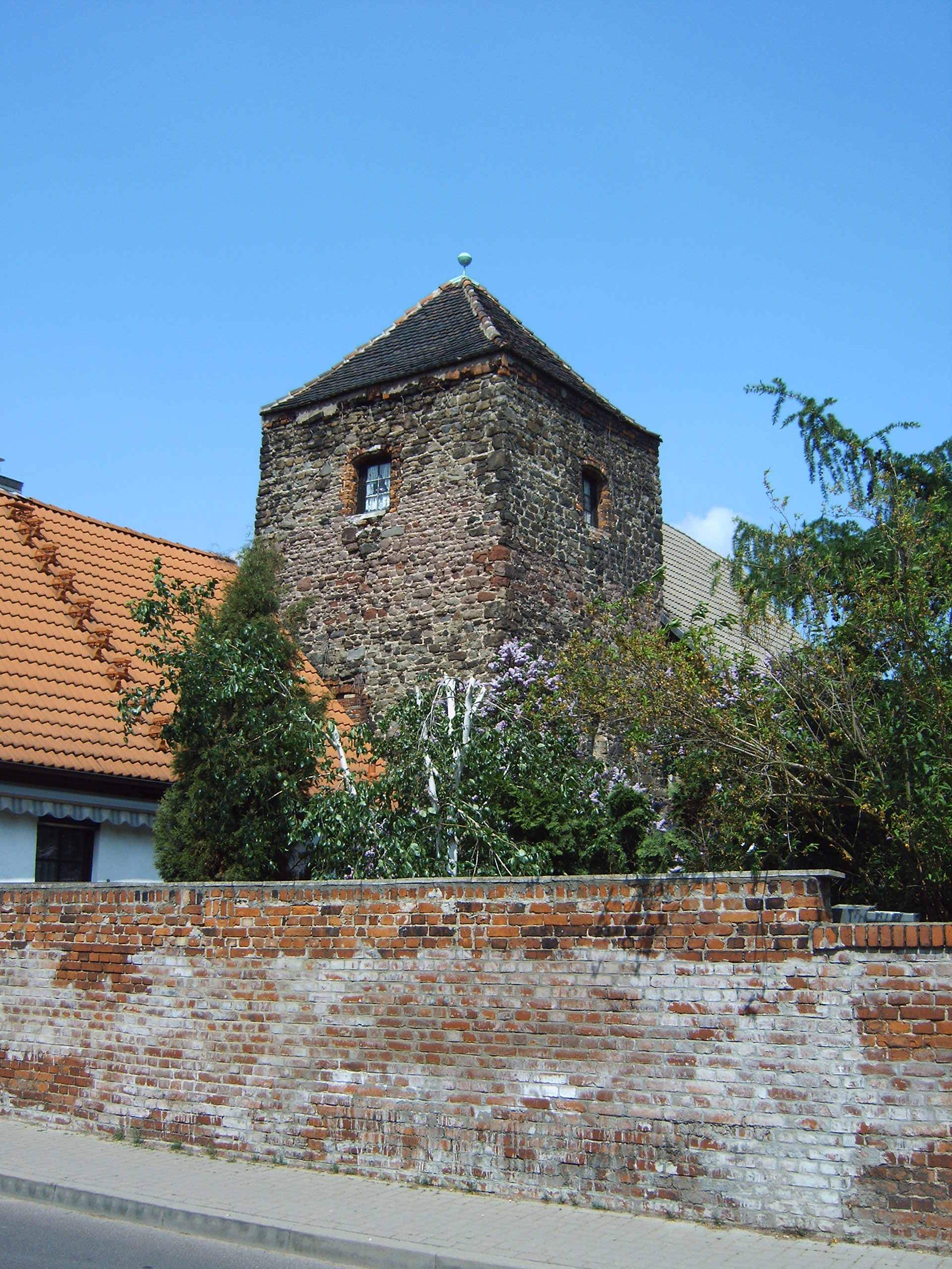 Turmhaus Rothensee, Magdeburg, Sachsen-Anhalt